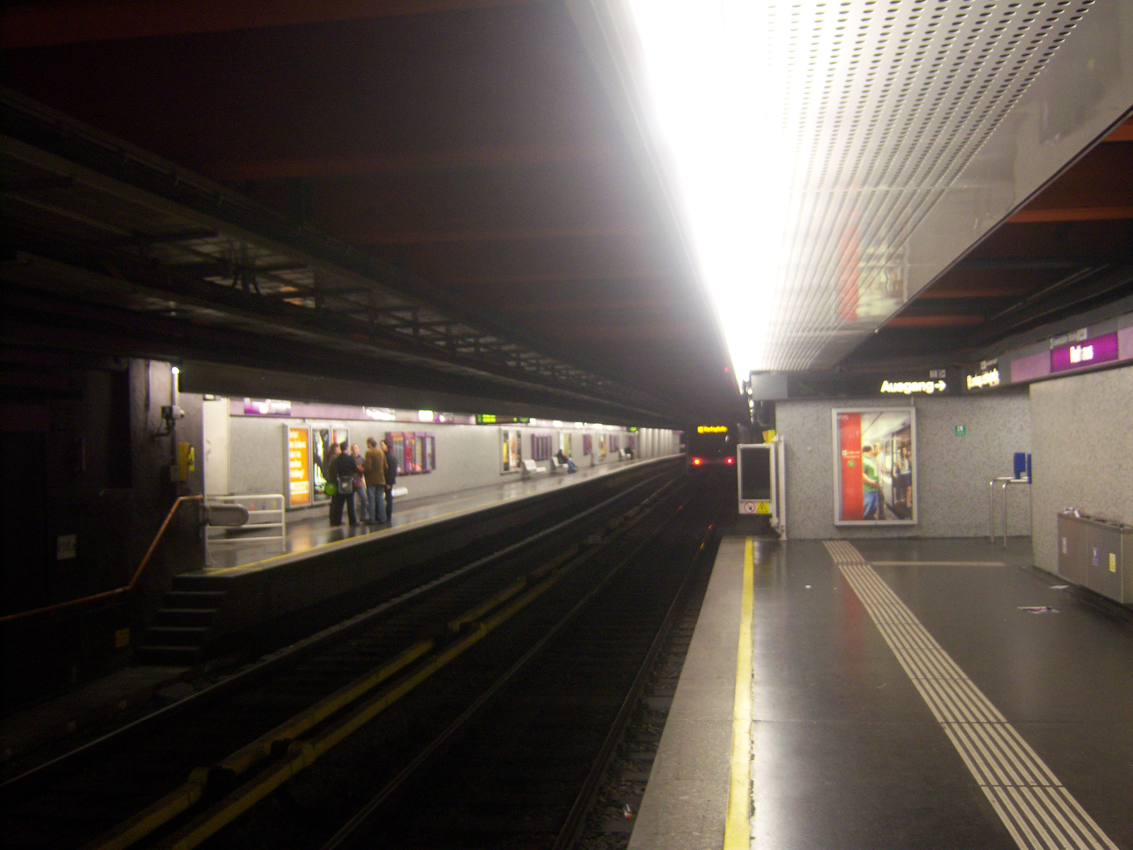 U2-Station Rathaus